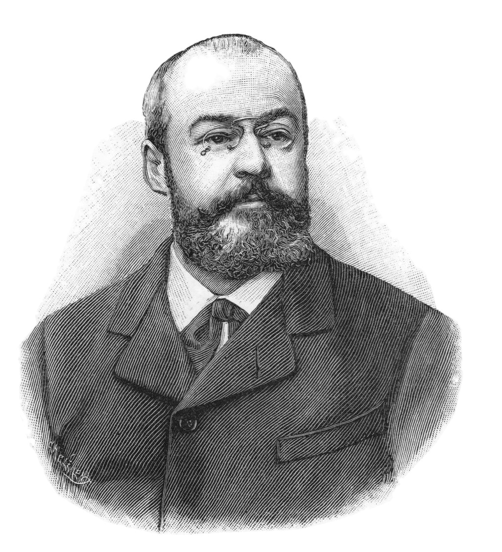 Émile Jean-Marie Gautier (19 janvier 1853 à Rennes1 - 1937) est un journaliste. Docteur en droit et disciple de Jules Vallès. Il fut militant et théoricien anarchiste impliqué dans le procès, dit « Procès des 66 » en 1883 à Lyon.